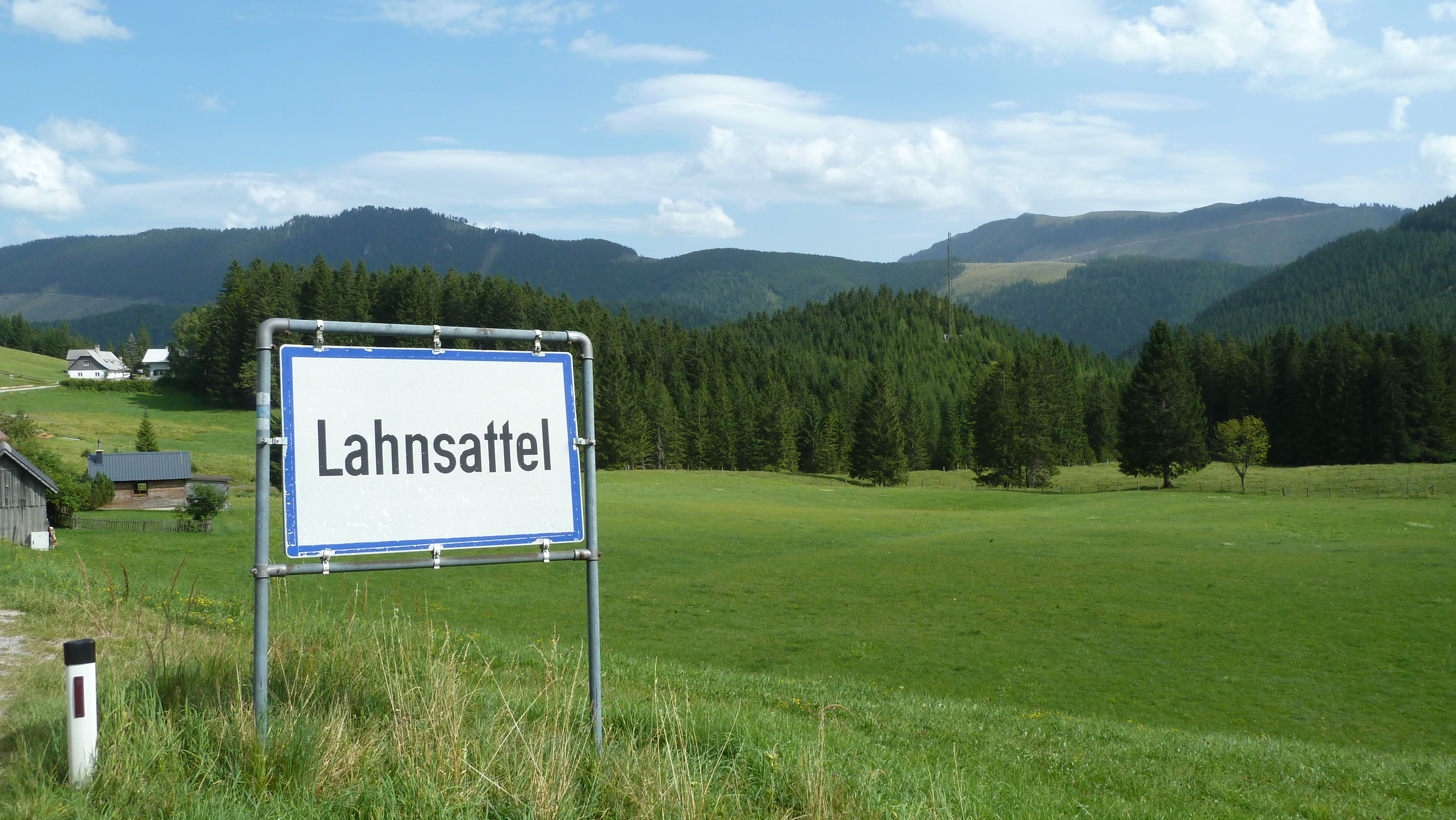 keine Hinweistafel des Sattels vorhanden, sondern nur Ortstafel des Ortes Lahnsattel